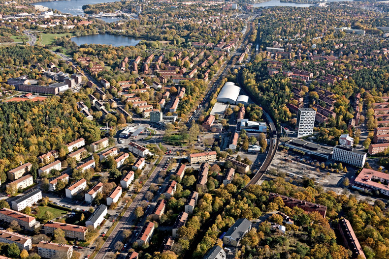 Bergslagsvägen (väg 275) mot O Motiv: Brommaplan Nyckelord: Flygbilder Kategori: Vägar Bergslagsvägen (väg 275) mot O.